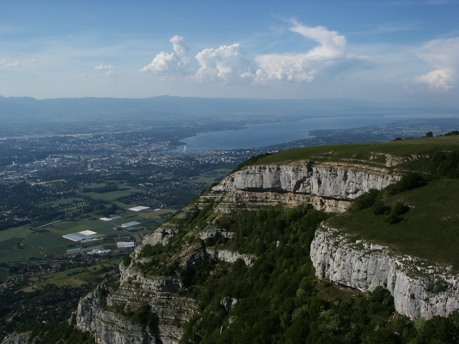 Le Mont Salève vu du Ciel avec Genève et son Jet d'Eau en arrière plan